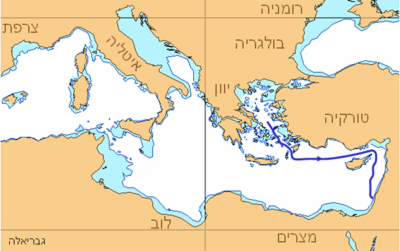 מסלול ההפלגה